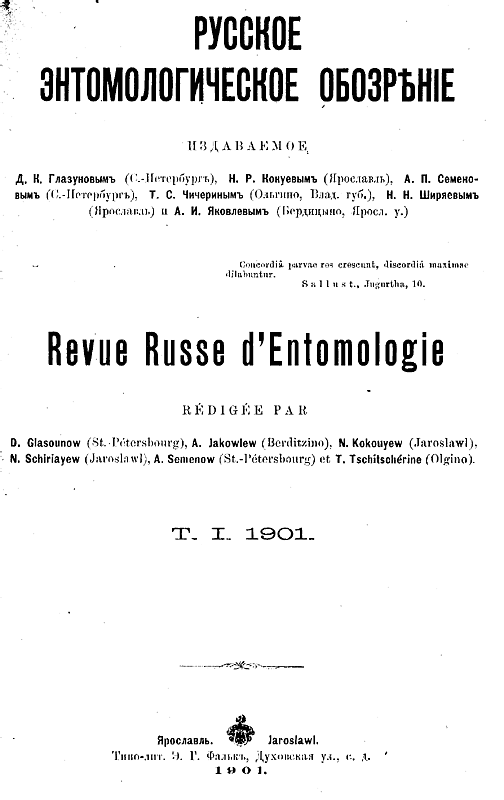 Русское энтомологическое обозрение. Т. 1. 1901.